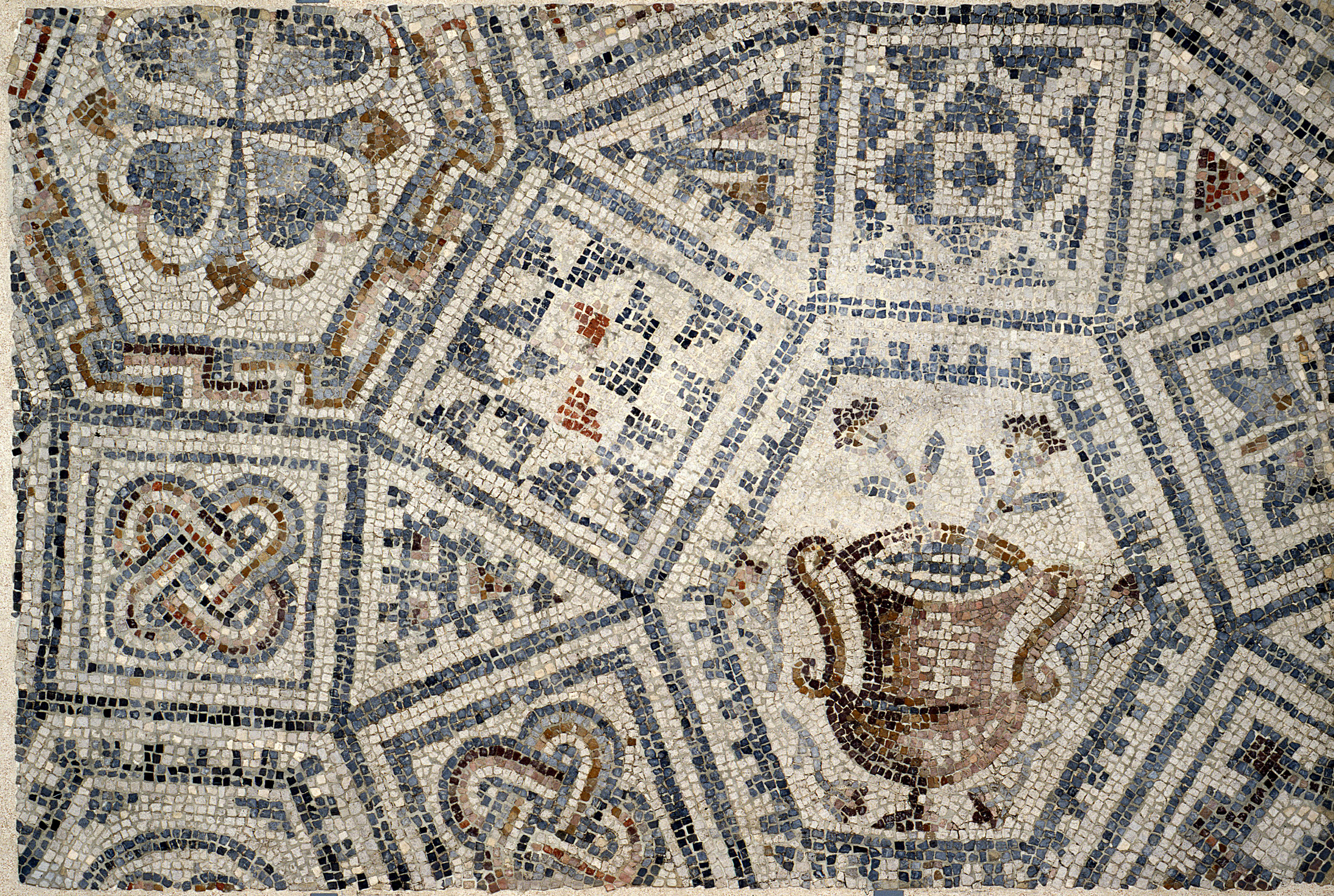 Mozaik iz Ljubljane, 3. stoletje, hrani Narodni muzej Slovenije.